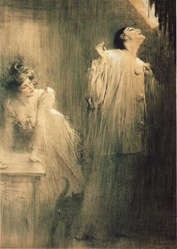 Pierrot et Colombine, ou Les Cantomines de Xavier Privas - Affiche